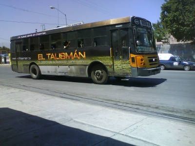 Ruta 14 de Transregio